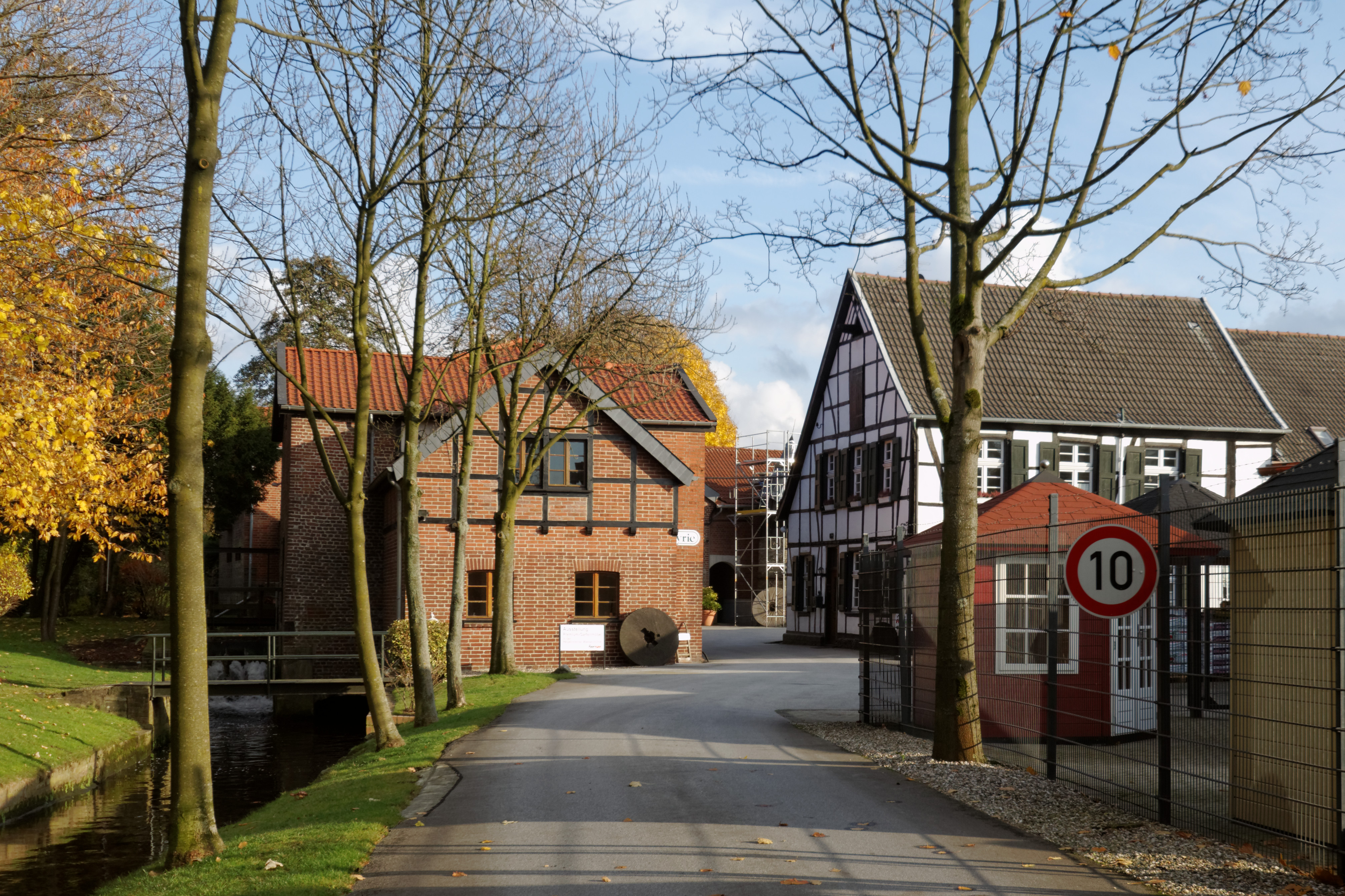 Ratingen-Lintorf, Hülsenbergweg; Helpensteinmühle